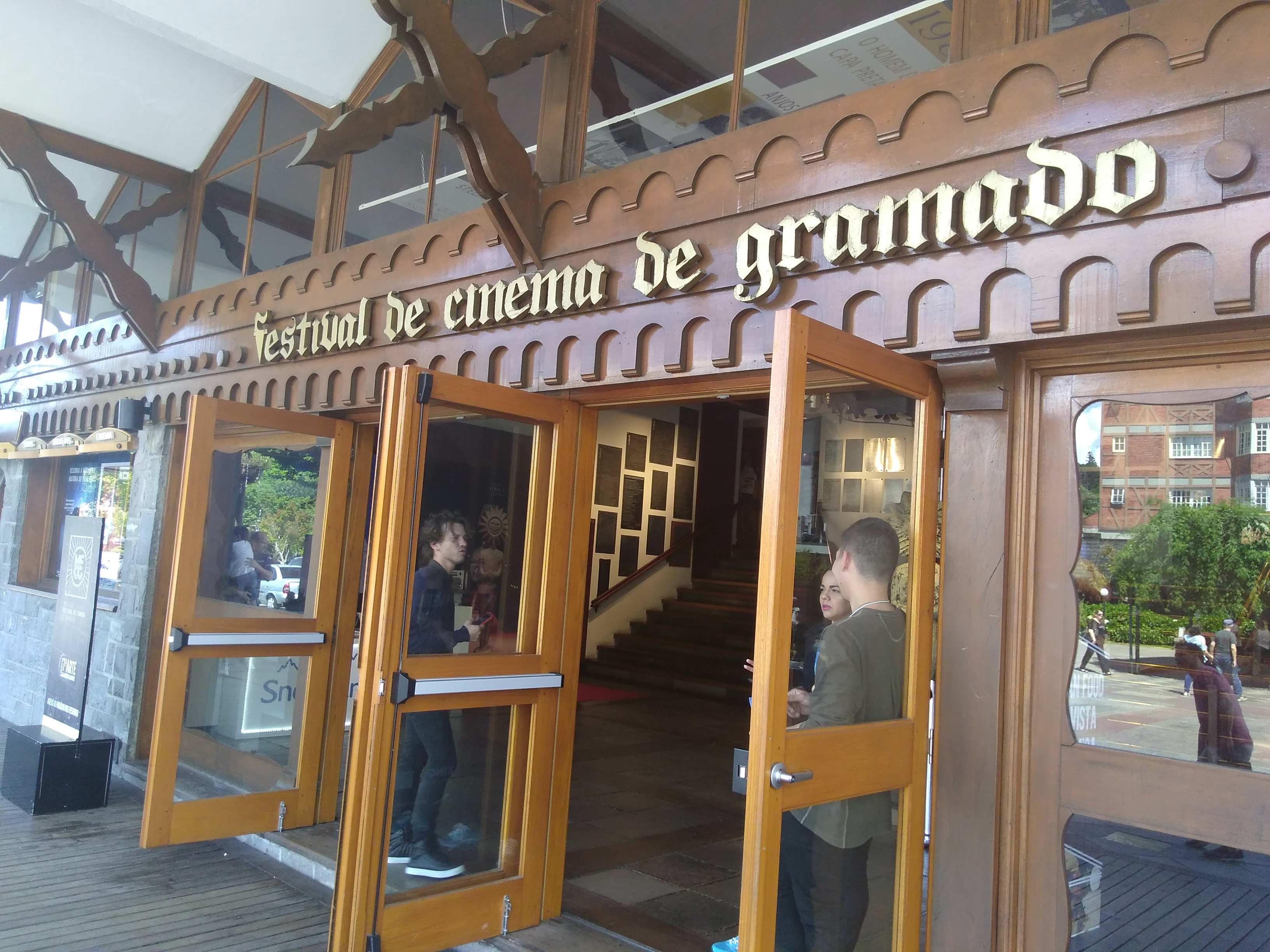 Vista da entrada do Palácio dos Festivais e Cine Embaixador de Gramado, RS